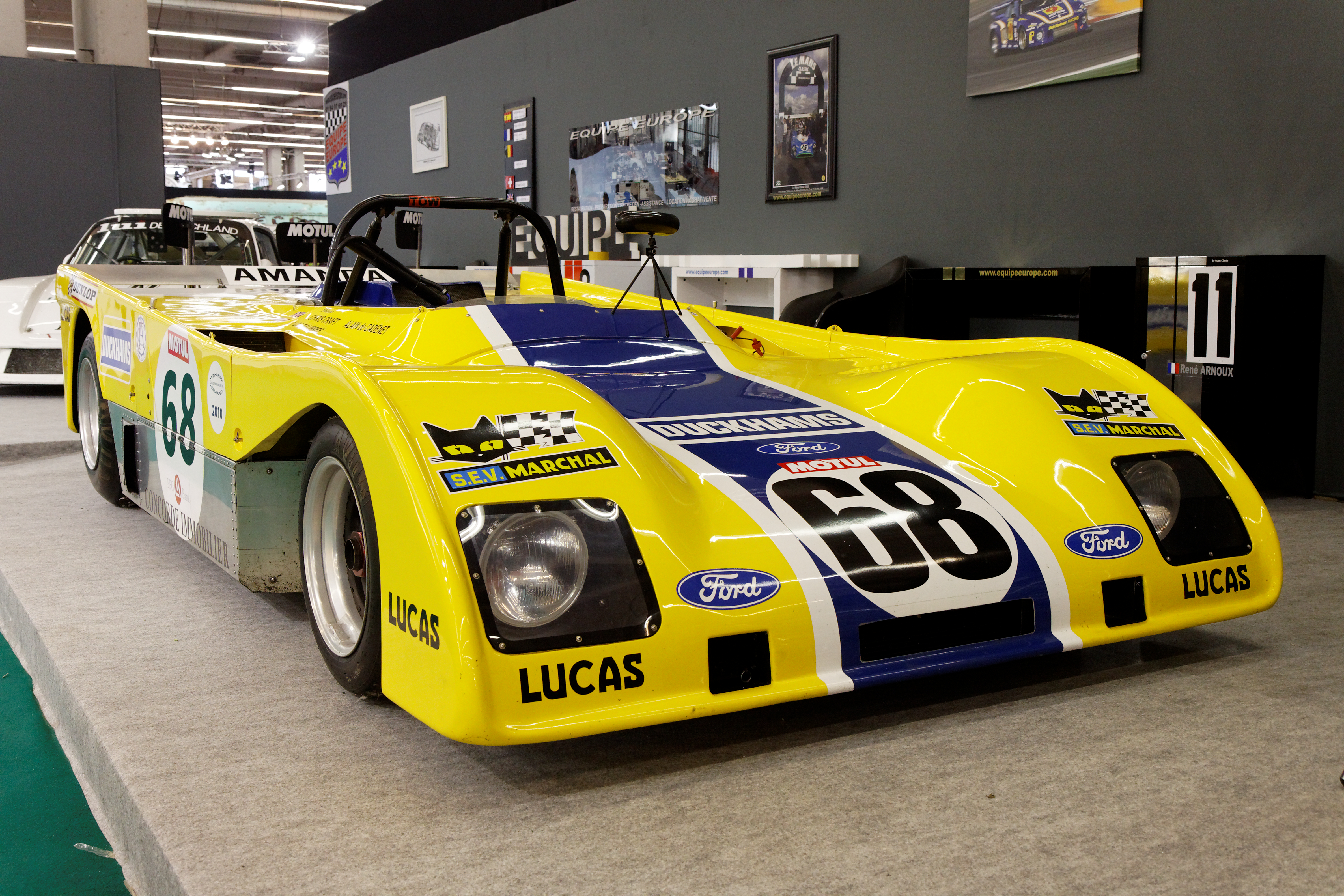 Photographie prise lors du salon rétromobile 2011 à Paris, porte de Versailles.